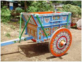 Carreta costarricense decorada